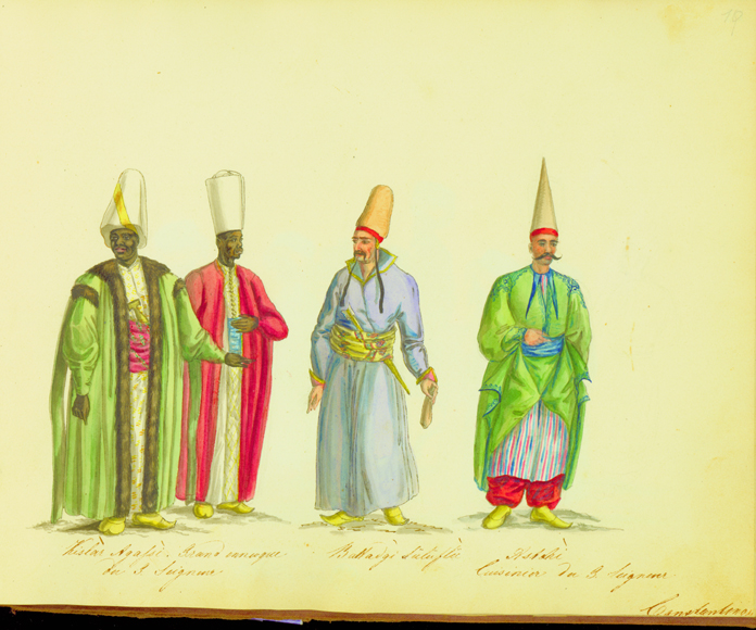 Kislar Agassi. Grand eunuque du G. Seineur. Bakadgi Sűlűslű. Astahi. Cuisinier du G. Seigneur